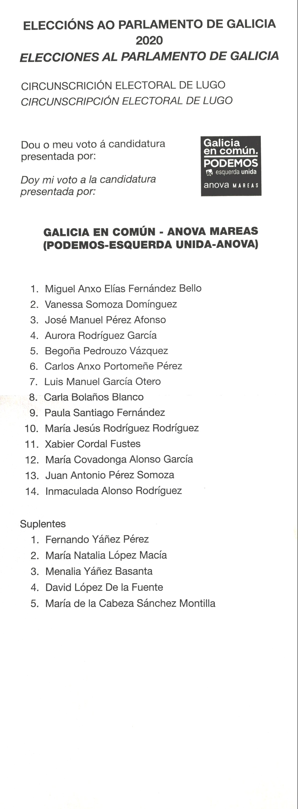 Papeletas electorais Eleccións ao Parlamento de Galicia 2020 pospostas circunscrición electoral de Lugo-Galicia en común Podemos